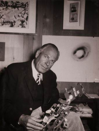 Portrait-Foto Theodor Ahrenberg